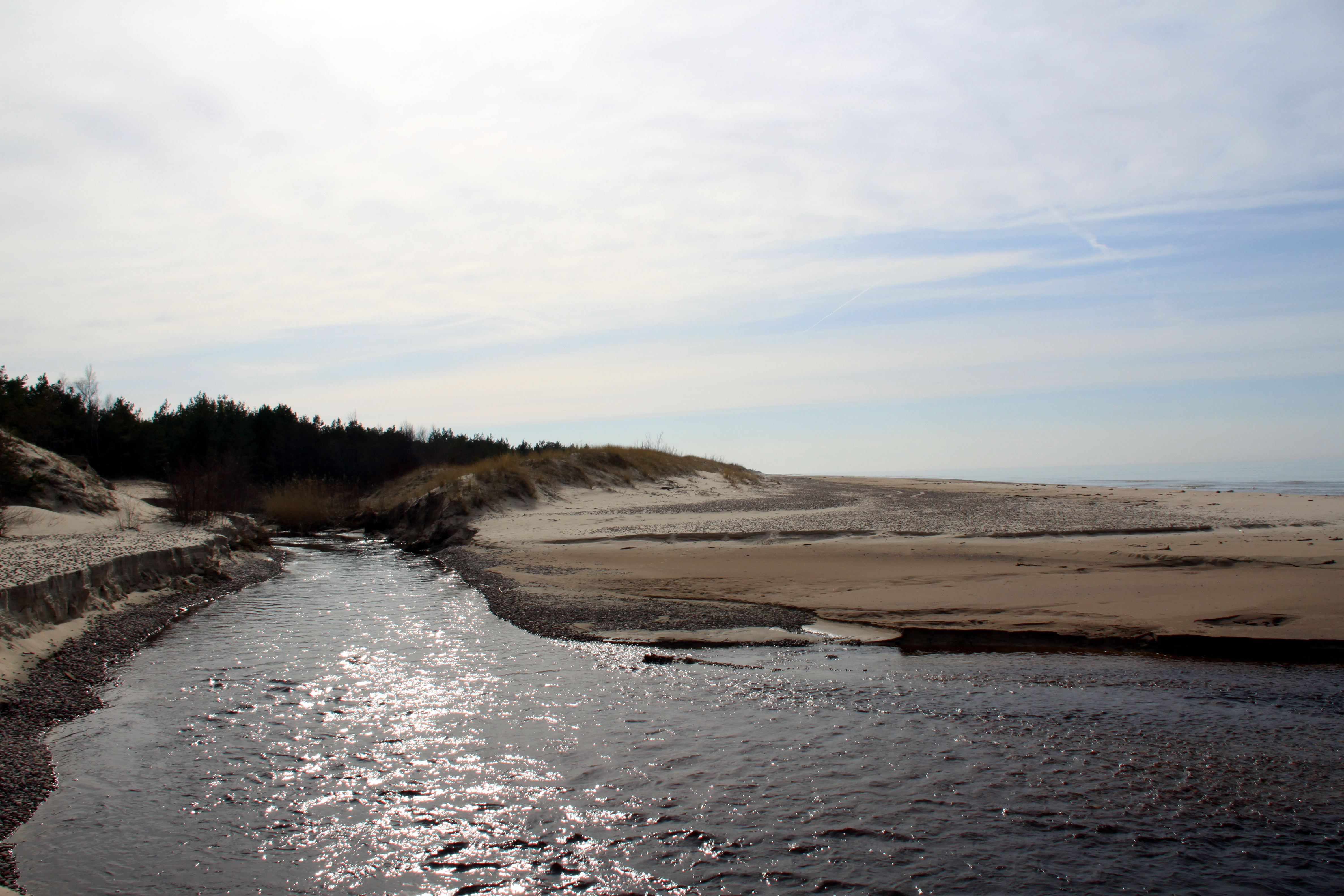 Rudupe